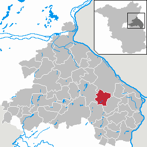 Gusow-Platkow in Brandenburg (Country) - District Märkisch-Oderland